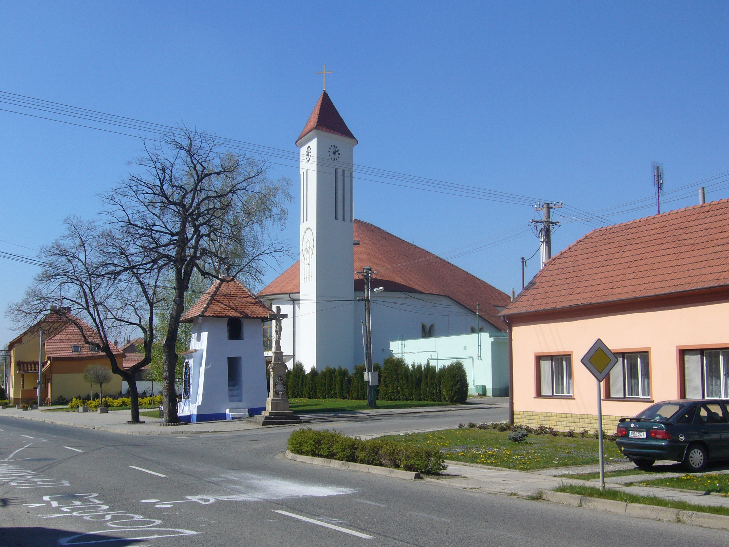 Nový kostel, vedle nějž se nalézá historická kaplička. Obě stavby stojí při hlavní silnici I/71, která obcí prochází.